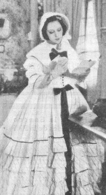 RAQUEL MELLER en la revista Caras y Caretas 15/04/1933, n. 1802, página 42. "Raquel Meller, la famosa tonadillera, en una de las más sentimentales escenas de "Violetas imperiales"